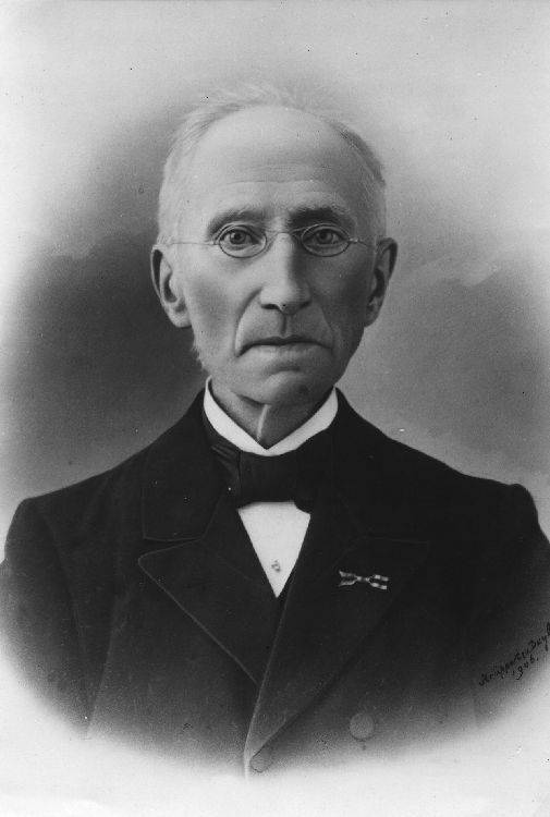 Tjibbe Geerts van der Meulen (1824-1906)